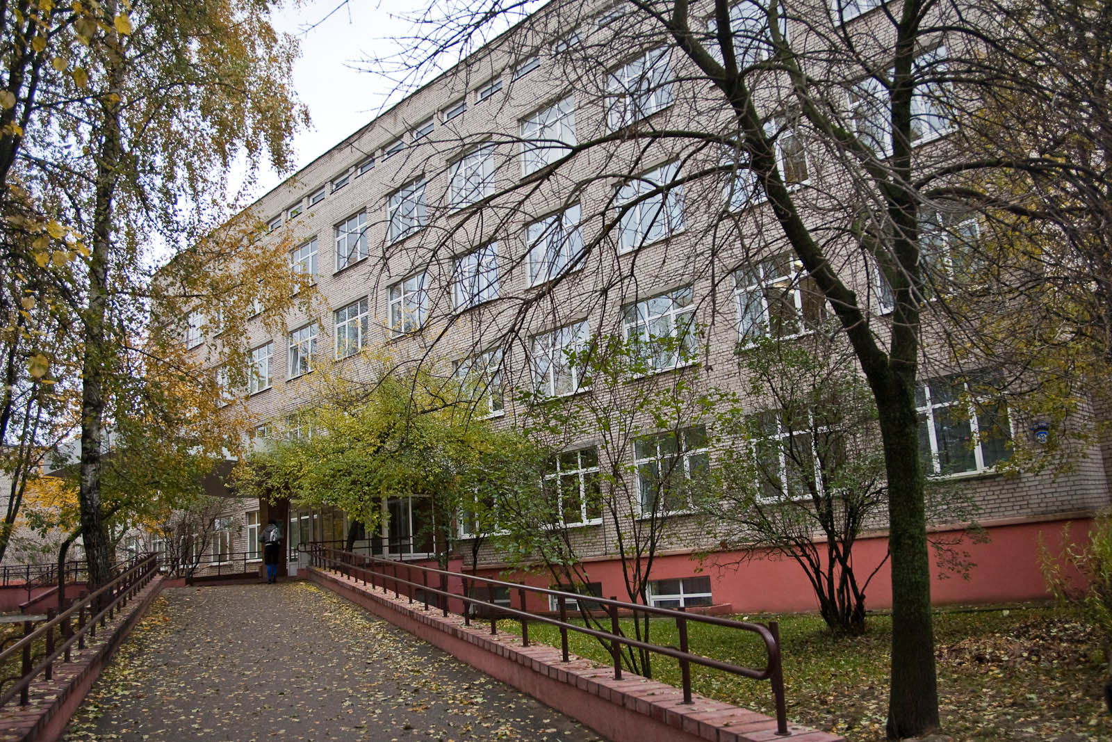 Здание №32 по ул. Захарова, Гродно, Беларусь. Здание является учебным корпусом №6 Гродненского Государственного Университета, в нём размещается Педагогический факультет.